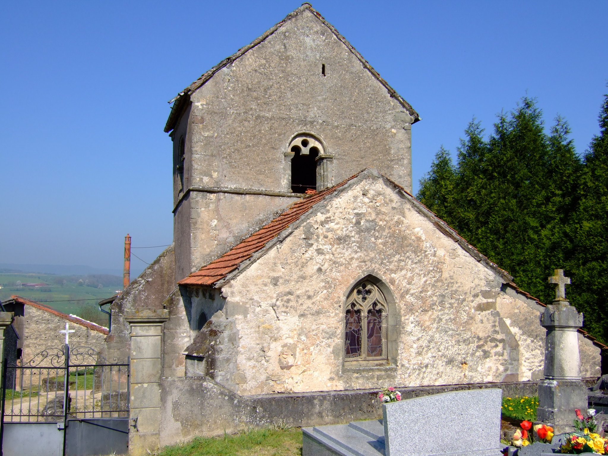 L'église de Fignévelle